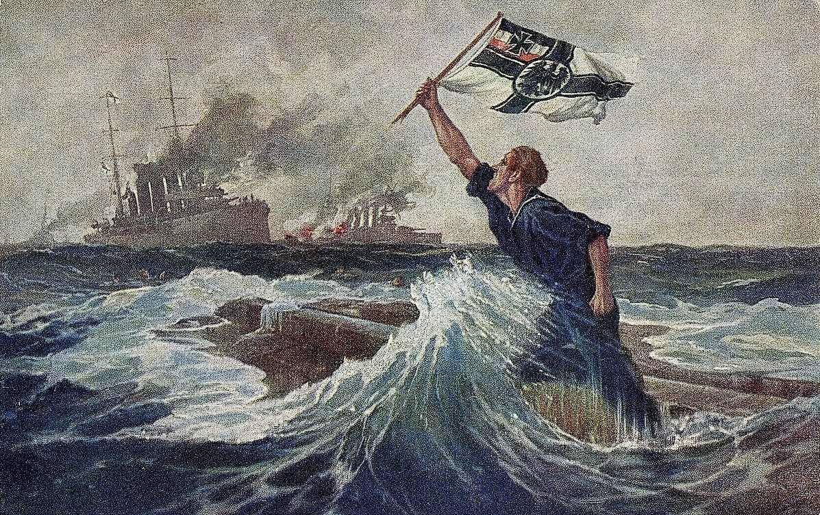 Hans Bohrdt: Der letzte Mann. (Ansichtskarte/Reproduktion, Das Gemälde ist seit 1916 verschollen)